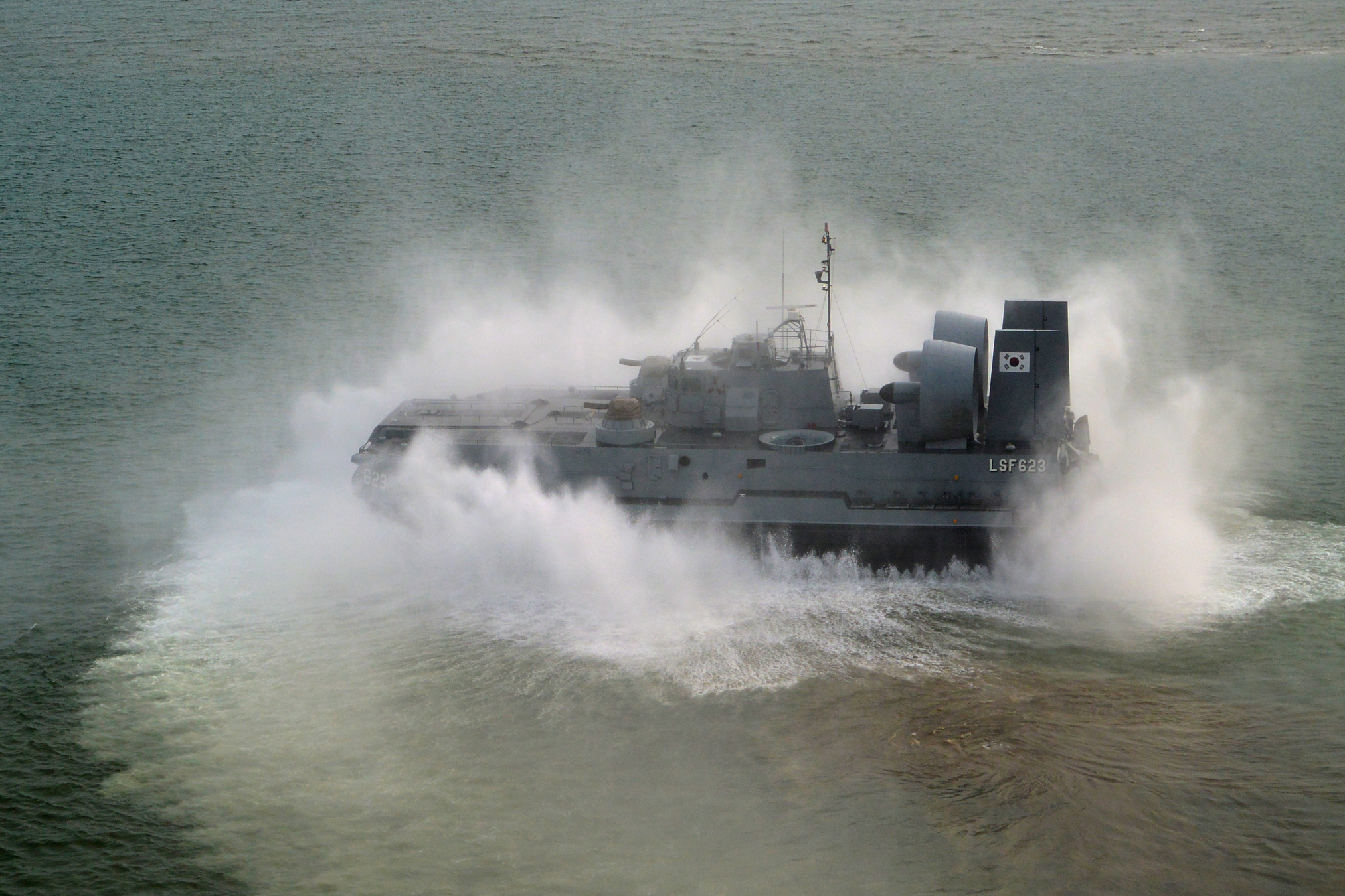 해군 상병 조승민 - 해병대 연평부대 우도경비대 292전탐감시대